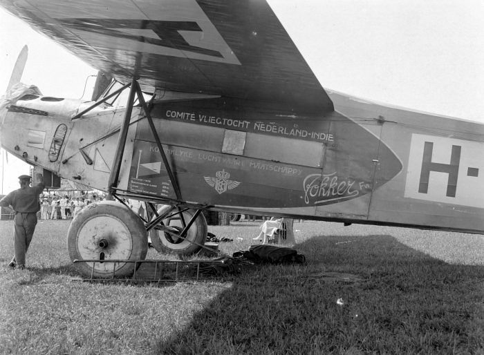 Negatief. De Fokker VII op het vliegveld te Medan, waar het op 24 november 1924 als eerste vliegtuig op de vlucht tussen Holland en Indië landde